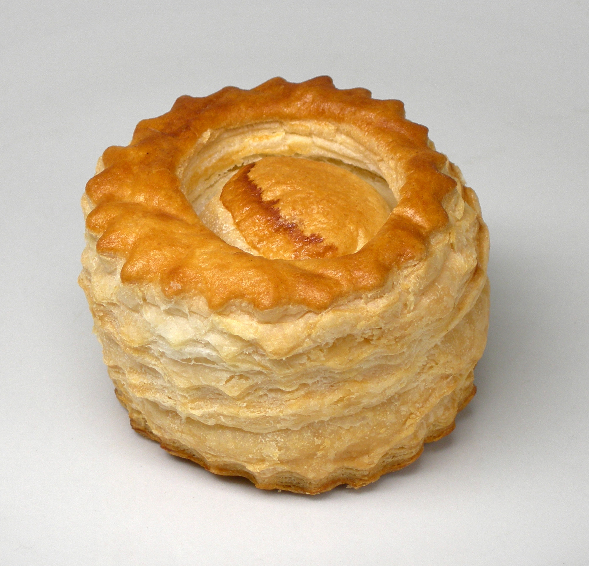 Vol-au-vent. Eigenen Aufnahme